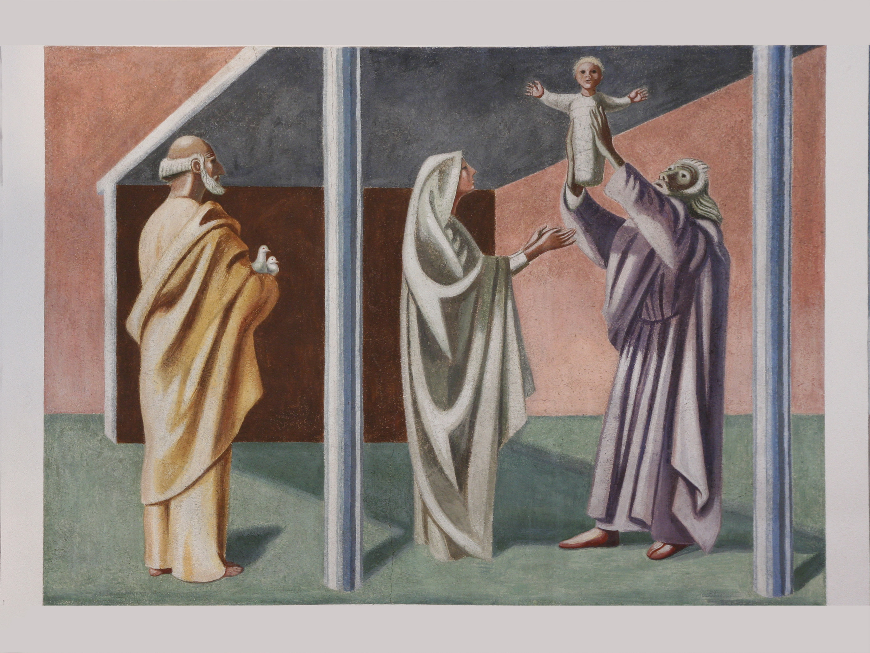 Römisch-katholische Pfarrkirche St. Theresia Zürich-Friesenberg, Fresko von Richard Seewald